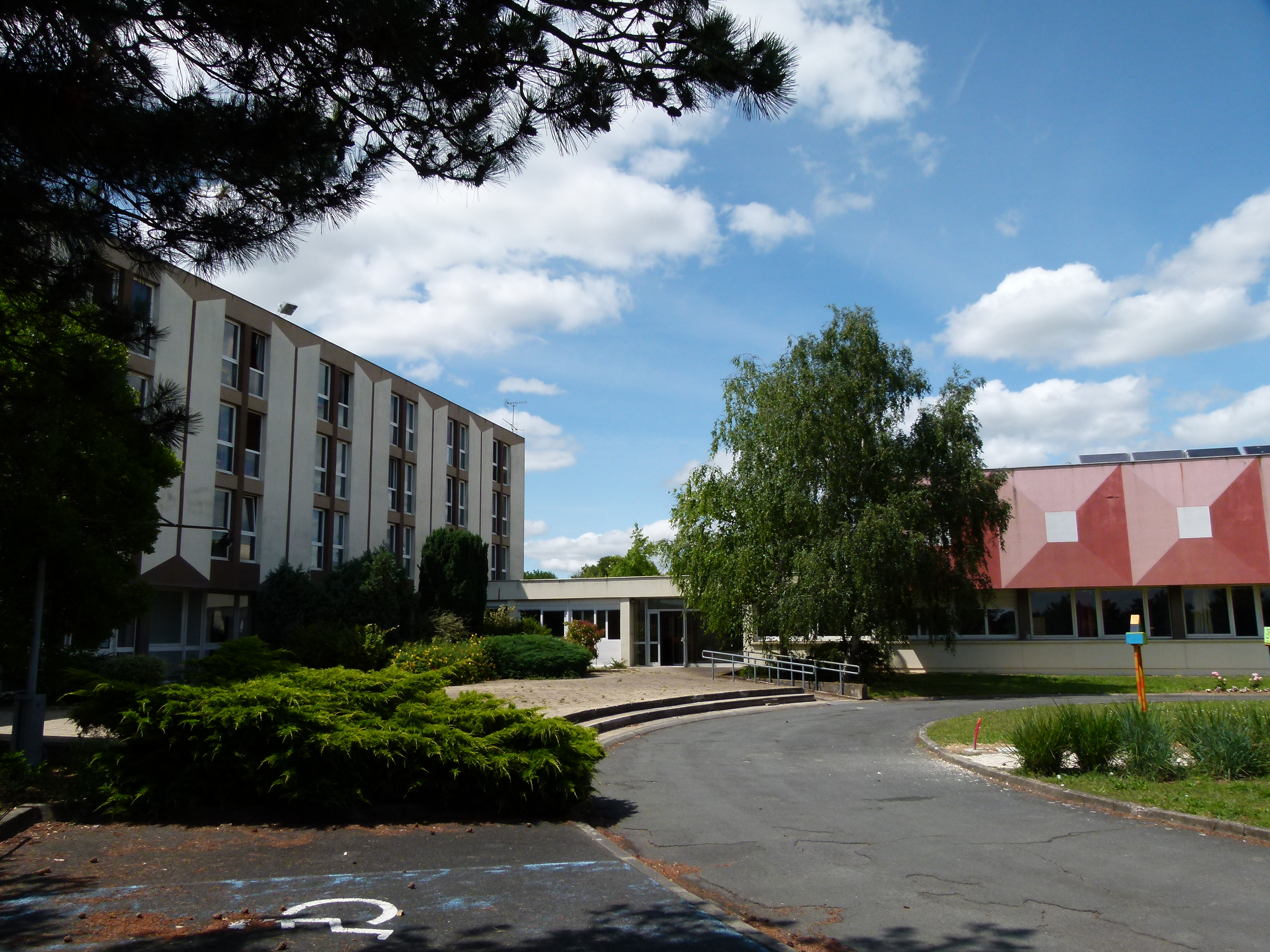 Surgères (Charente-Maritime, France) - L'ENILIA, l’École nationale d'industrie laitière.